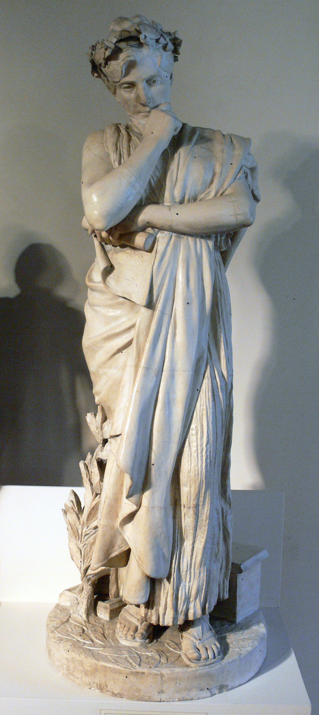 Jean-Léon Gérôme - L'industrie métallurgique (La Douleur), plâtre patinée, Vesoul, musée Georges-Garret, 901.1.1, don de l'artiste en 1901